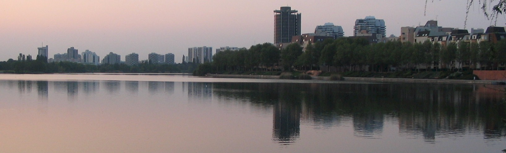 Vue panoramique de Créteil (Val-de-Marne) au bord du lac. Source : photo personnelle (Clio64). Catégorie:Créteil